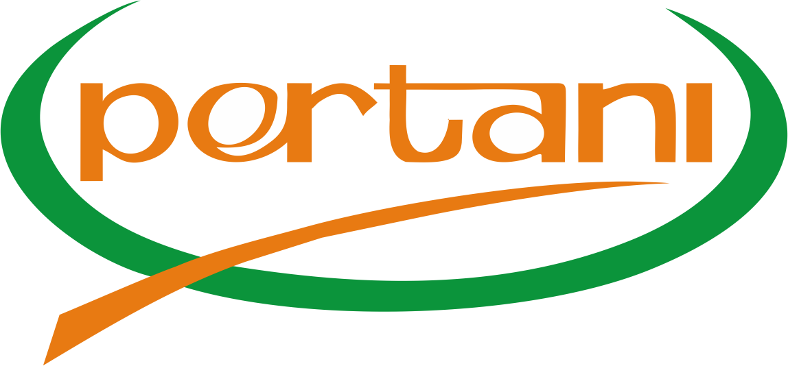 Logo Pertani ke-2